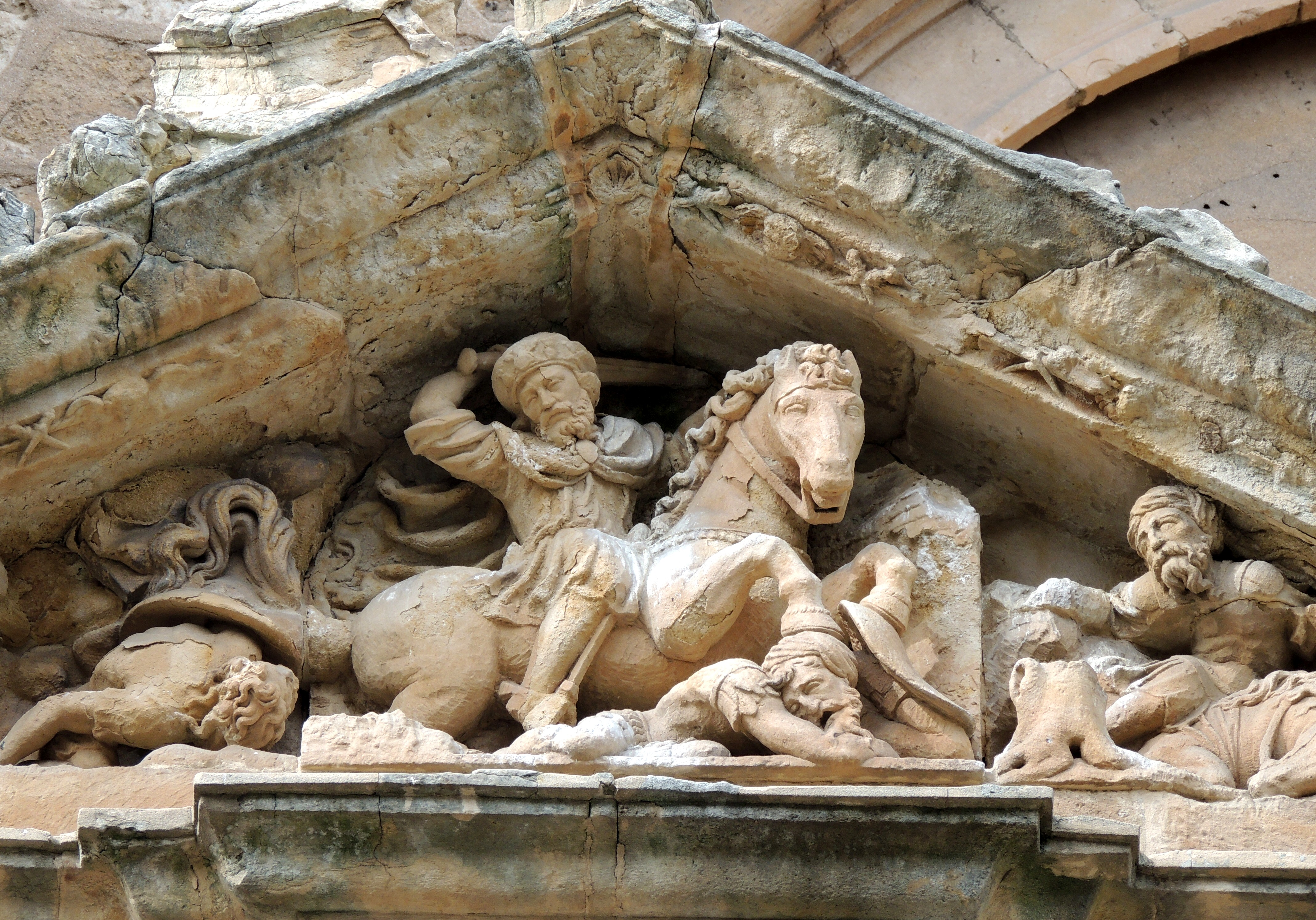 Relieve de Santiago Matamoros en el tímpano de la fachada sur de la iglesia de Sancti Spiritus, Salamanca (España)